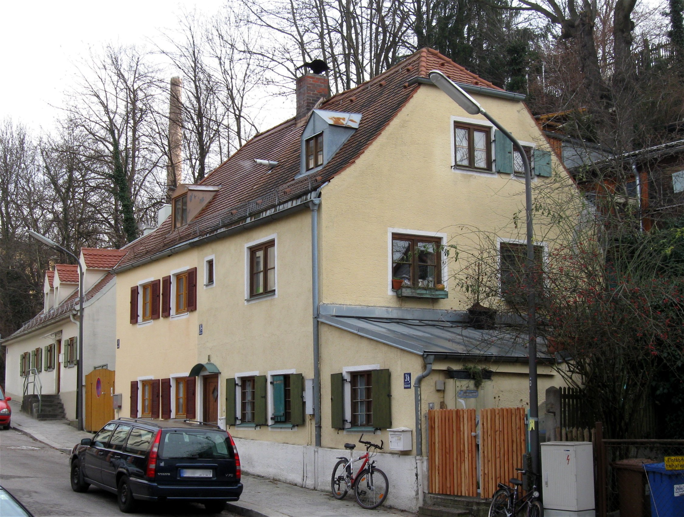 Nockherstraße 3; Zweigeschossiges Schopfwalmhaus, um 1800